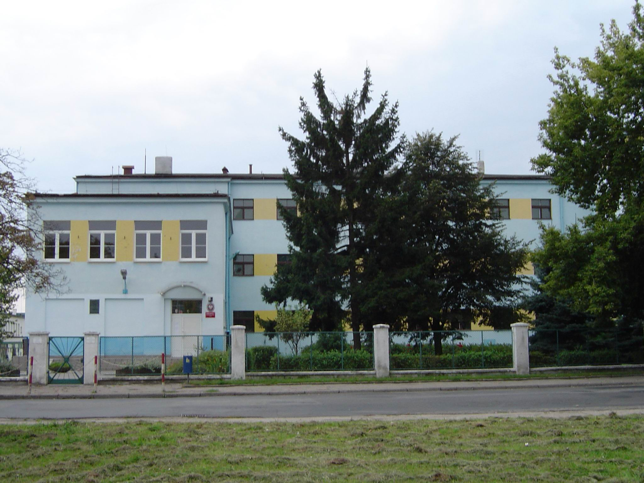 Gimnazjum nr 7 w Grudziądzu